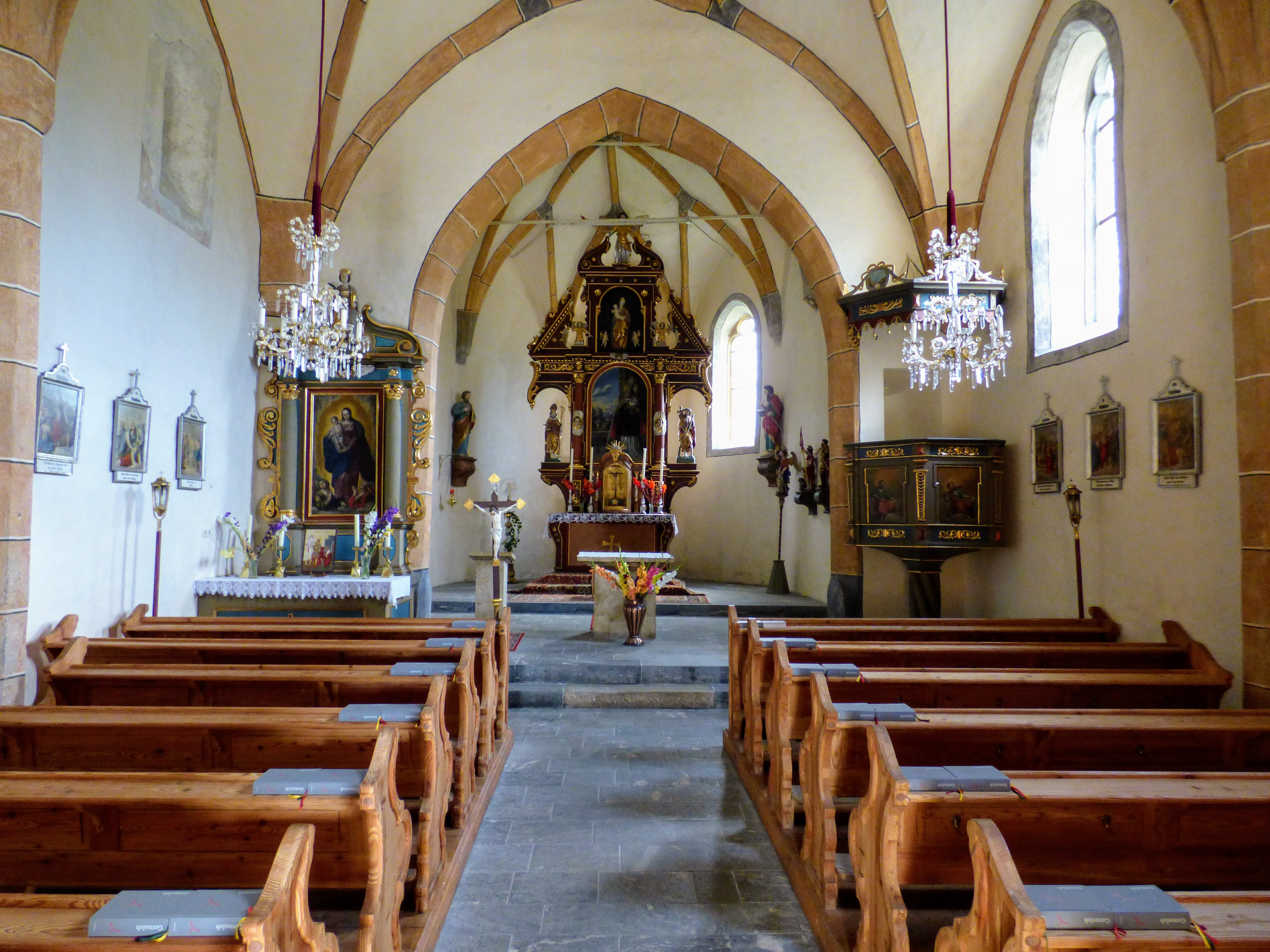 Inneres der Kath. Pfarrkirche hl. Martin, Greith (Gemeinde Neumarkt, Steiermark)